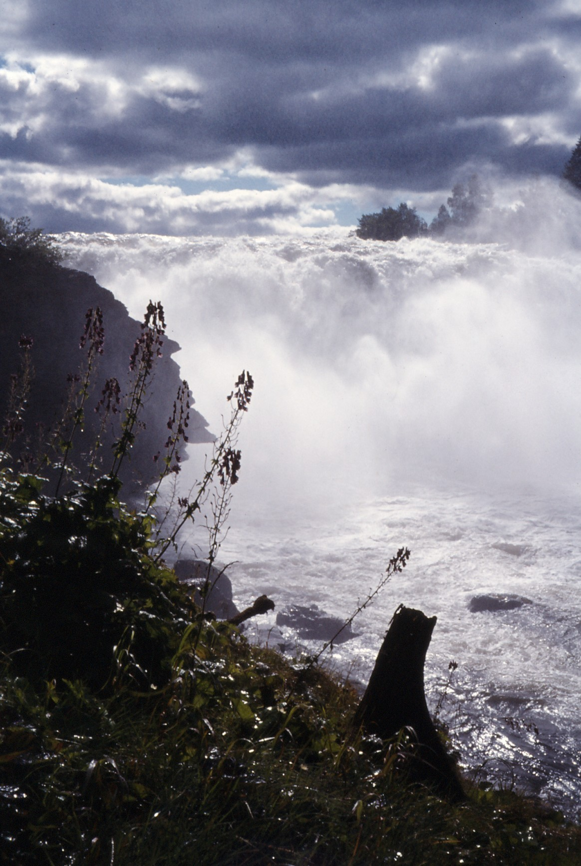 Ristafallet i Jämtland i Sverige